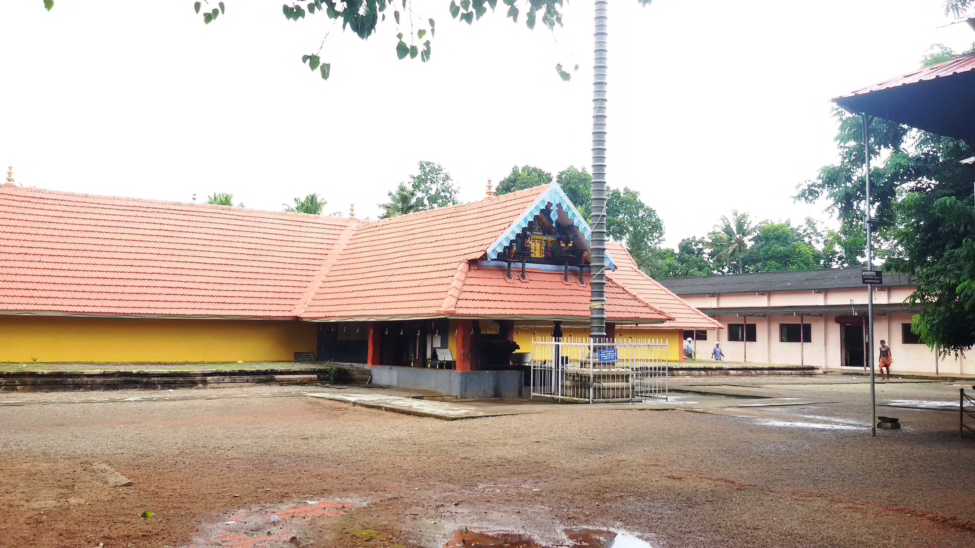 ചെറിയനാട് ശ്രീബാലസുബ്രഹ്മണ്യസ്വാമീക്ഷേത്രം